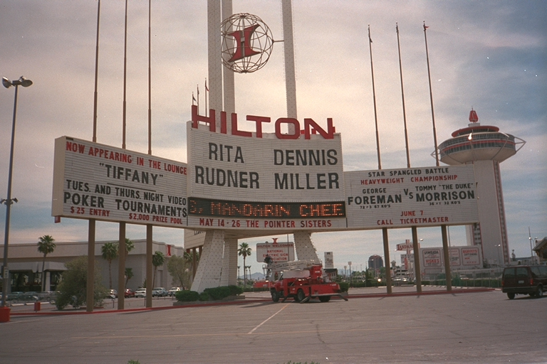 Las Vegas Hilton marquee, 1993